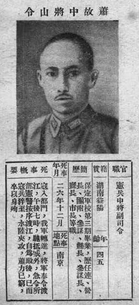 抗戰軍人忠烈錄第一輯中的烈士遺像